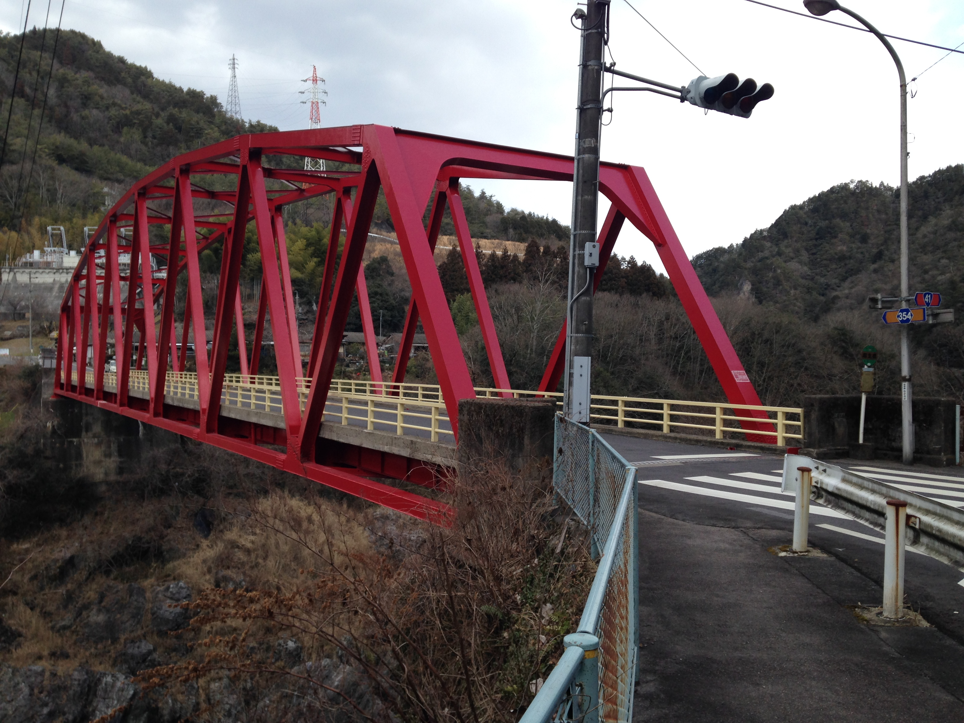 南側より望む上麻生橋